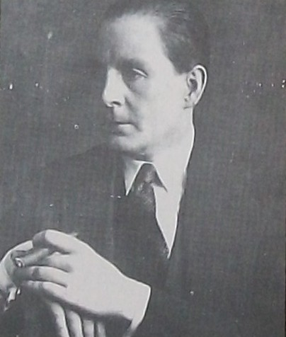 Héctor Pedro Blomberg